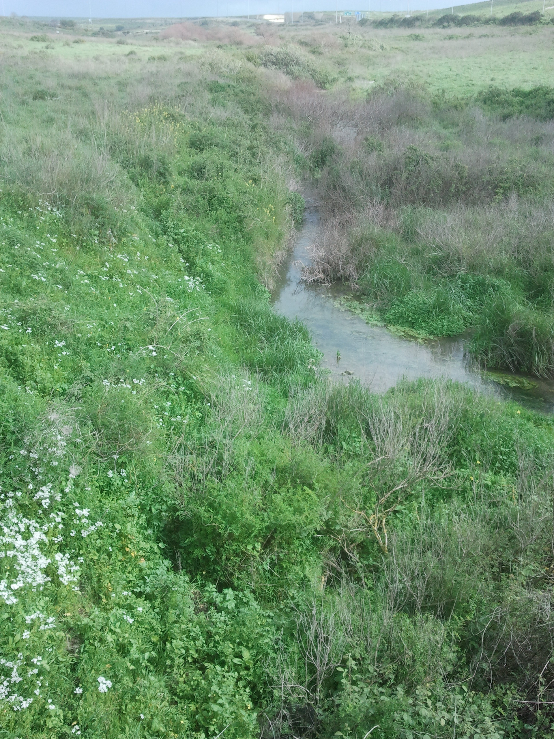 נחל תות הווה גבול בין הר הכרמל ורמות מנשה. תחילתו ליד מחלף אליקים והוא נשפך לנחל דליה ליד בת שלמה